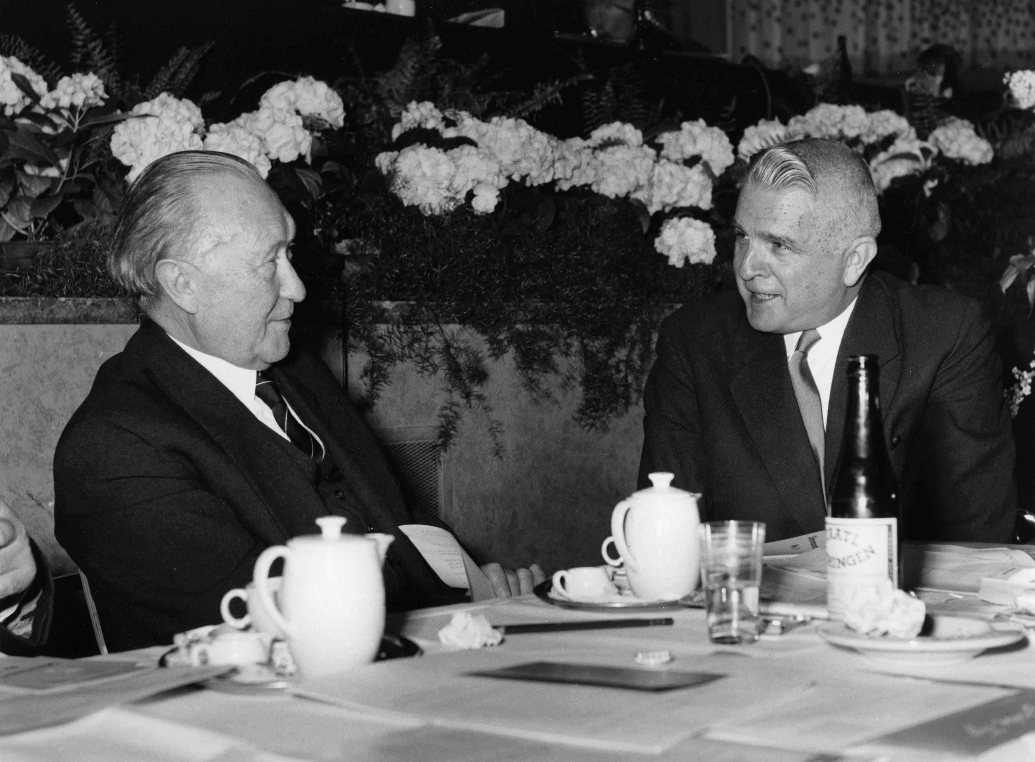 Adenauer, Konrad9. CDU-Bundesparteitag, 26.04.1960 - 29.04.1960